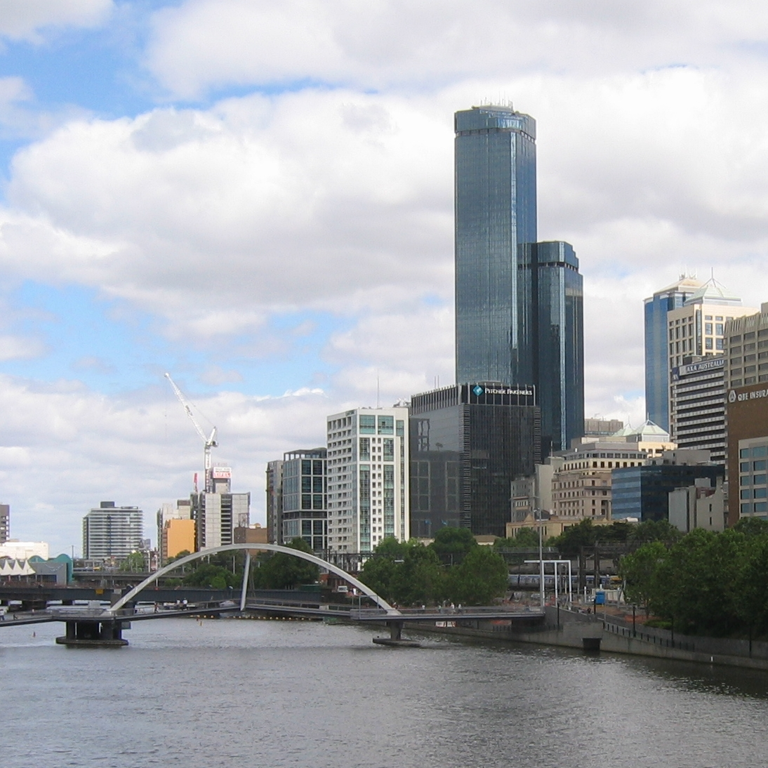 Tretji najvišji nebotičnik v Melbournu.